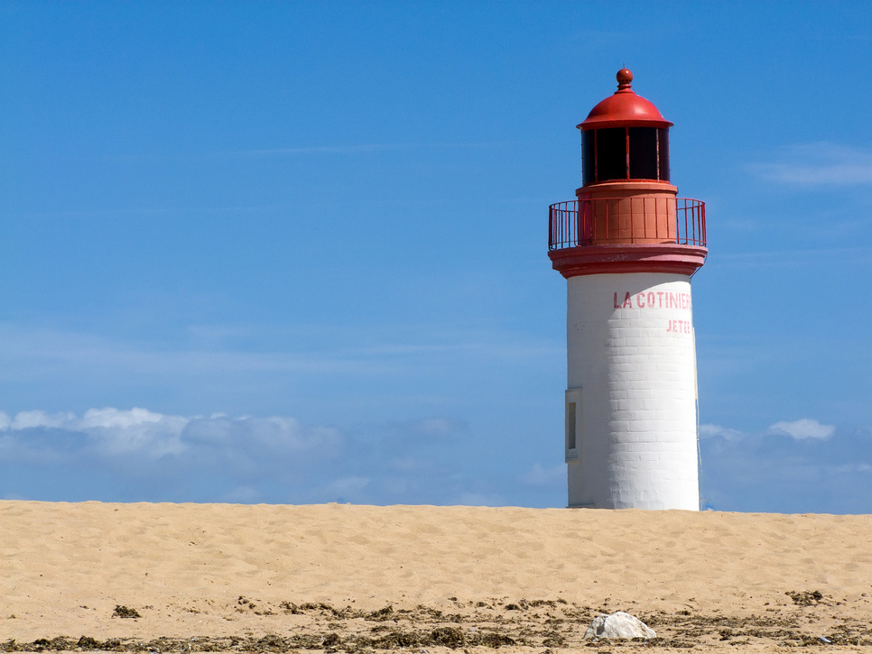 Phare, vue de la Plage de la Cotiniére, île d'Oléron, 29 aout 2009